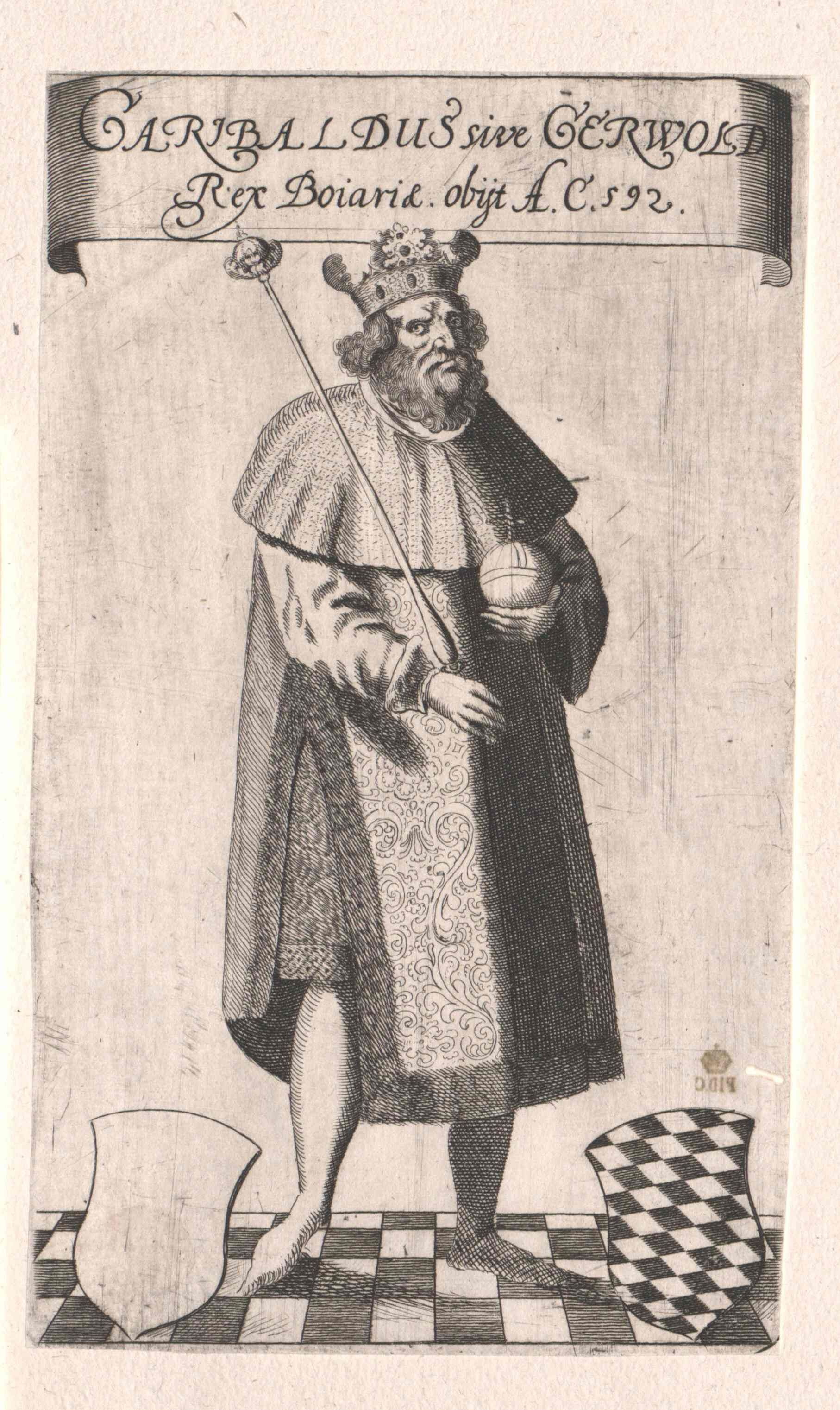 Retrato de Garibaldo I Rey y Duque de Baviera, con escudos paterno y materno.